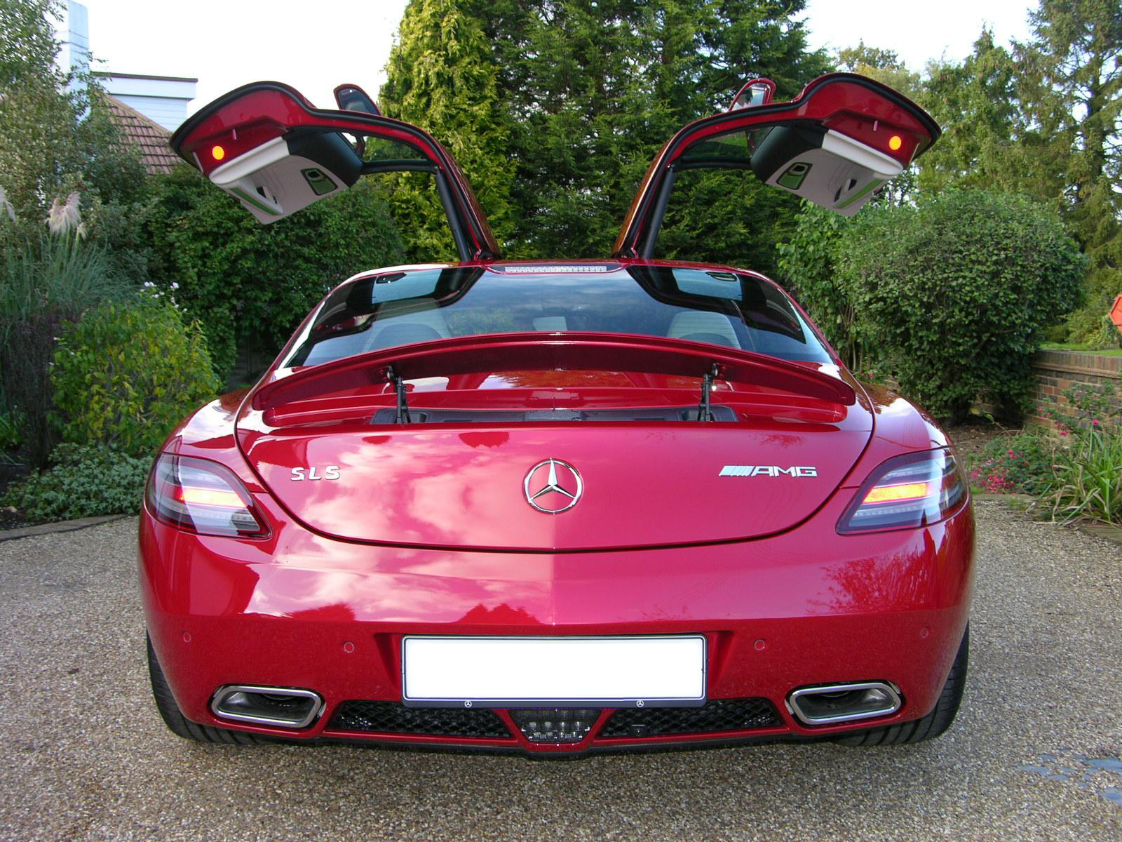 Mercedes Benz SLS AMG